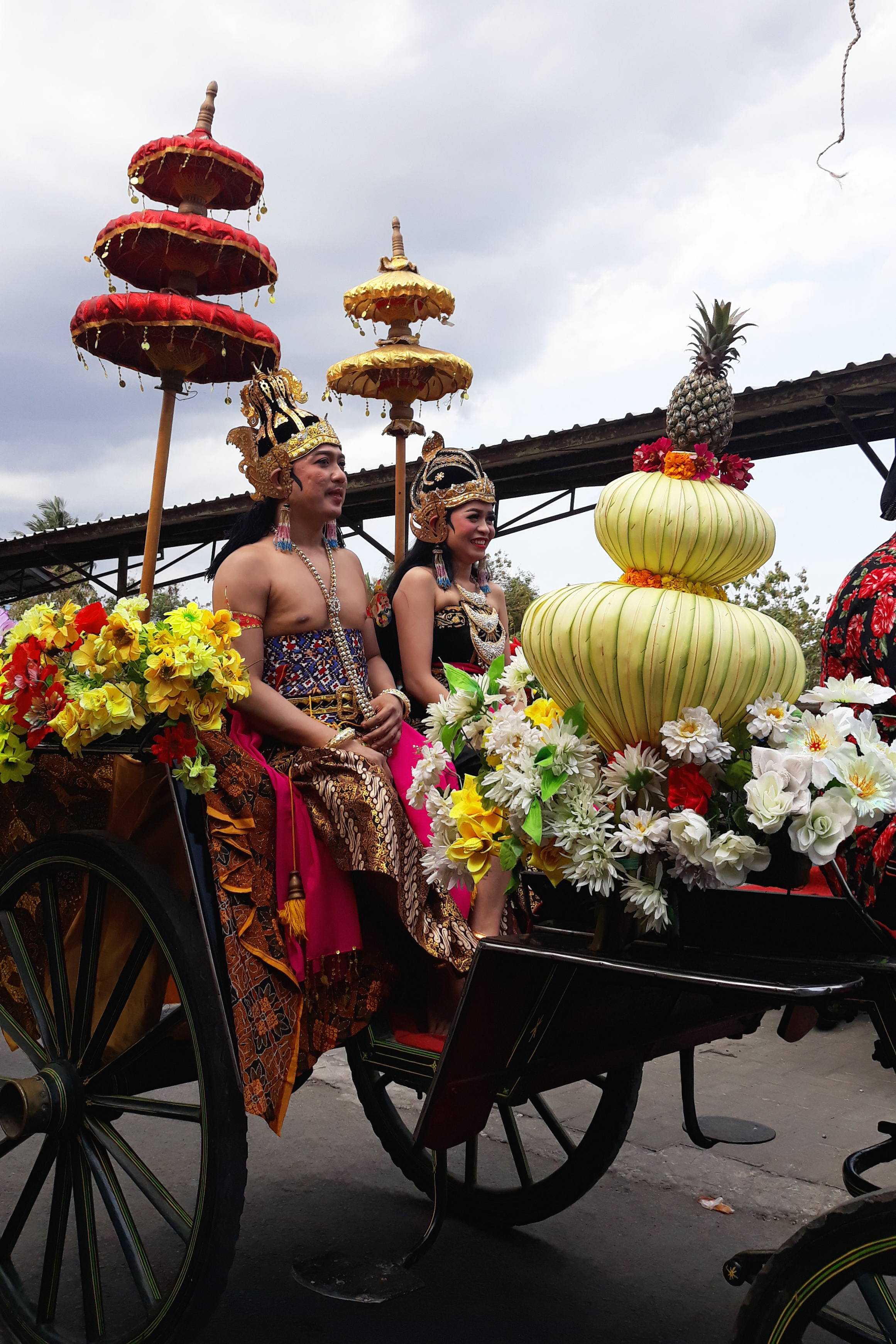 Pada acara Merti Dusun atau upacara bersih desa yang diadakan di Dusun Glondong, Desa Panggungharjo, Sewon, Bantul, Yogyakarta, 15 September 2018 kemarin, salah satu RT dari delapan RT yang mengikuti kirab memeriahkannya dengan menghadirkan kirab pengantin pria dan wanita lengkap dengan kereta kuda. Pengantin pria dan wanita tersebut menggunakan busana pengantin paes ageng, busana pengantin tersebut dulunya hanya digunakan oleh putra dan putri Sultan di lingkungan Keraton Ngayogyakarta Hadiningrat. Selain busana pengantin yang digunakan, kereta kuda yang digunakan untuk membawa kedua pengantin dihias dengan bunga-bunga, payung, serta janur yang uniknya diberi buah nanas pada puncaknya, sehingga kereta kuda tersebut menjadi cukup meriah.